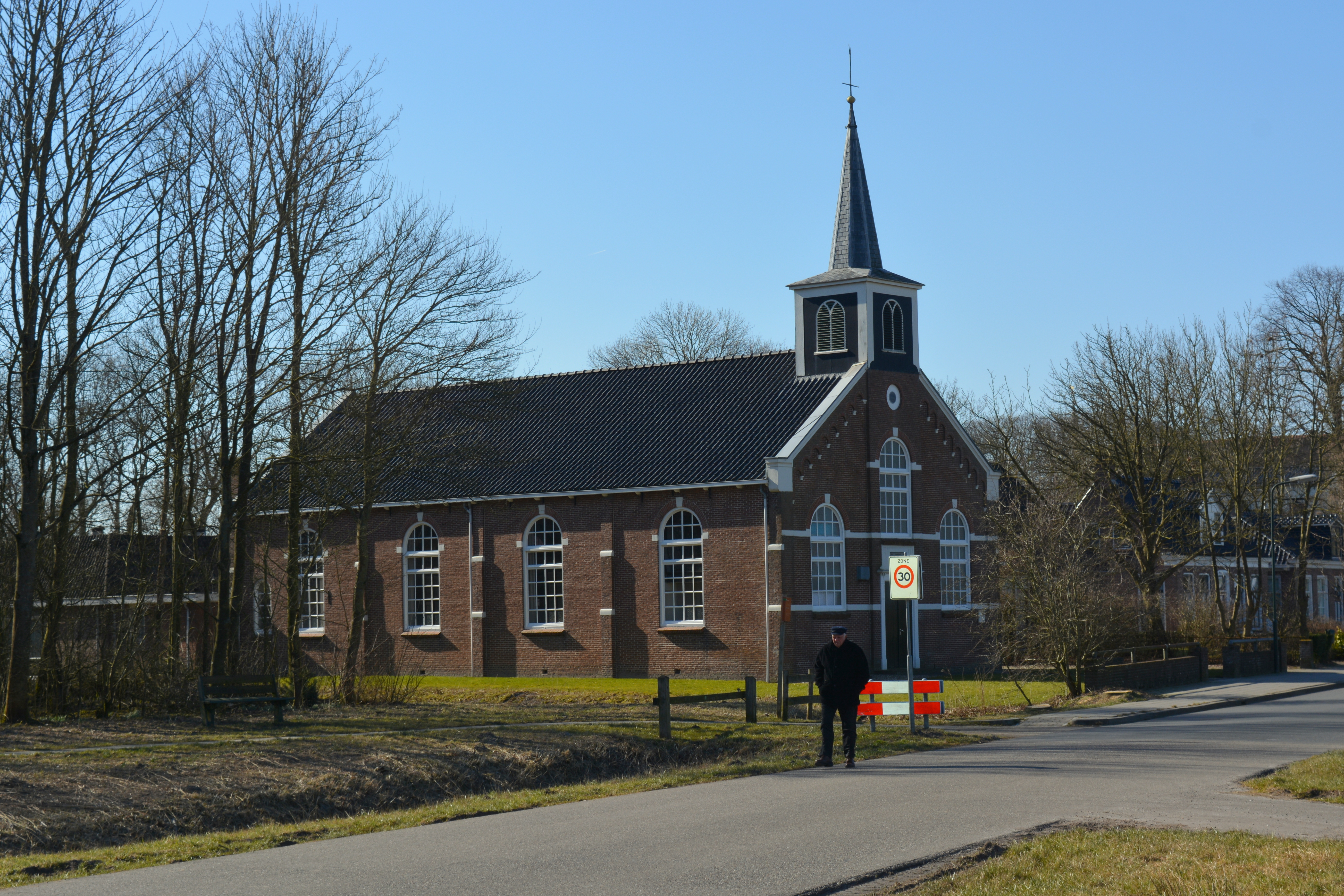 Mitselwier, Protestanske tsjerke Rehoboth (foarhinne grifformeard)